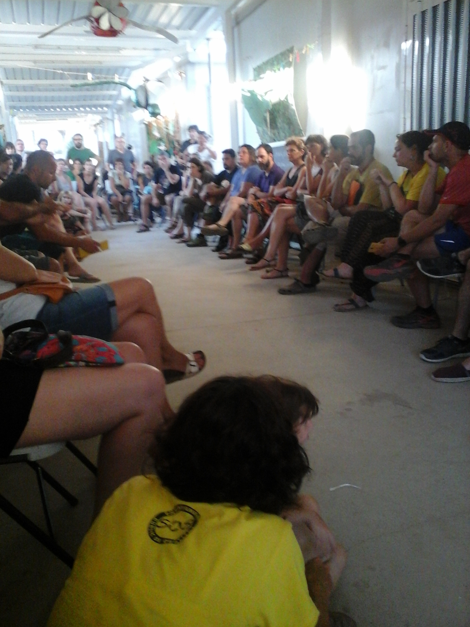 Assemblea dia 21 de juny de 2005 en protesta de la imposició d'un director extern a l'escola Mar Nova